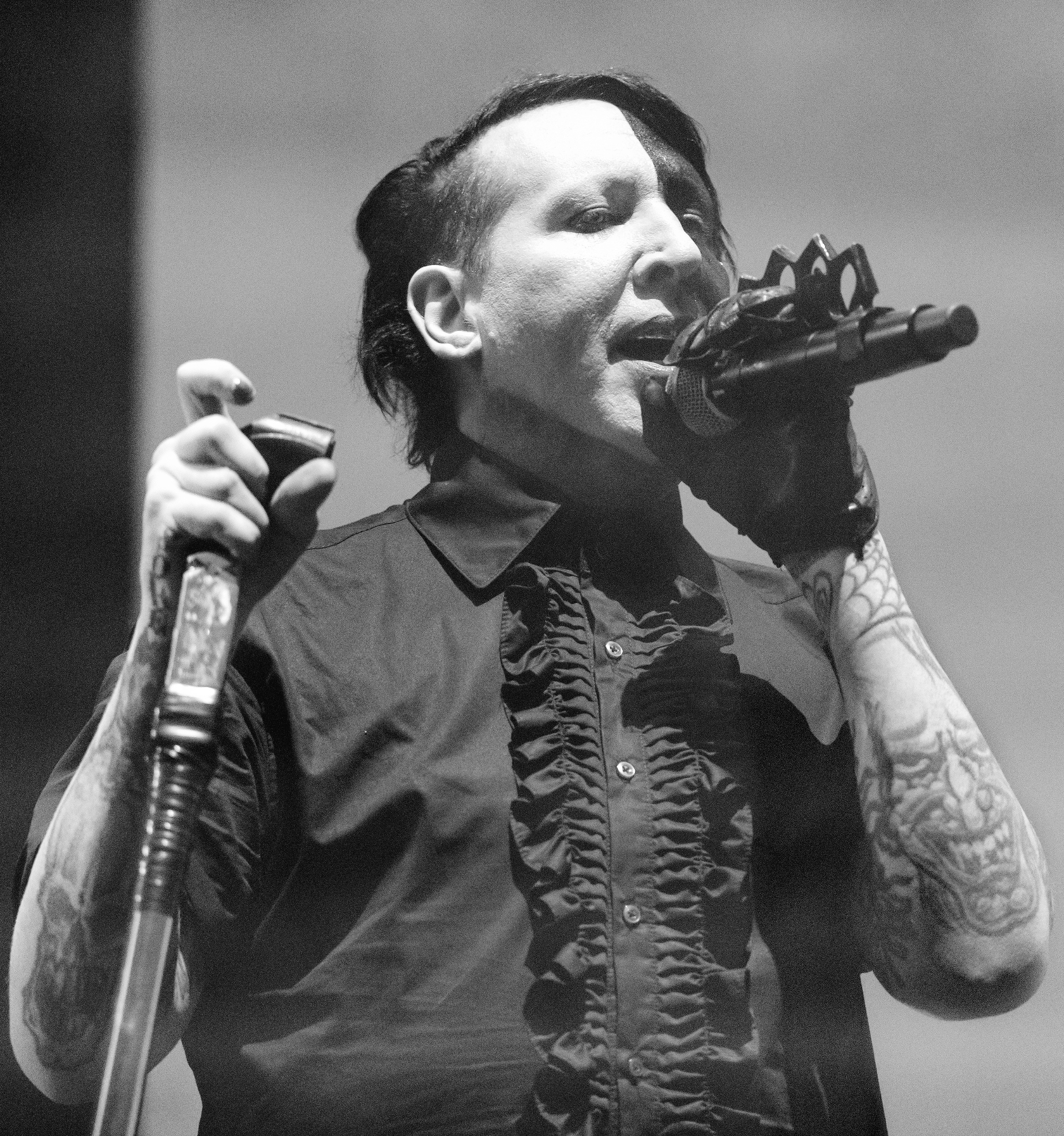 Marilyn Manson @ Rock am Ring 2018